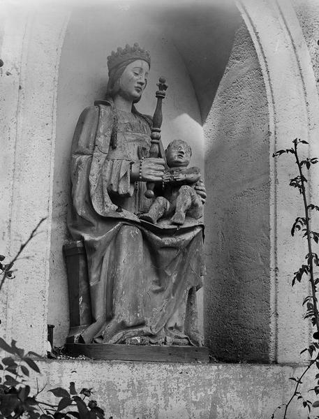 Fargues église